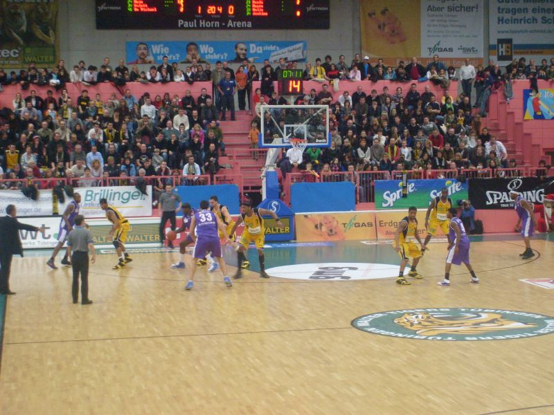 Spielszene WalterTigers Tübingen - BG 74 Göttingen